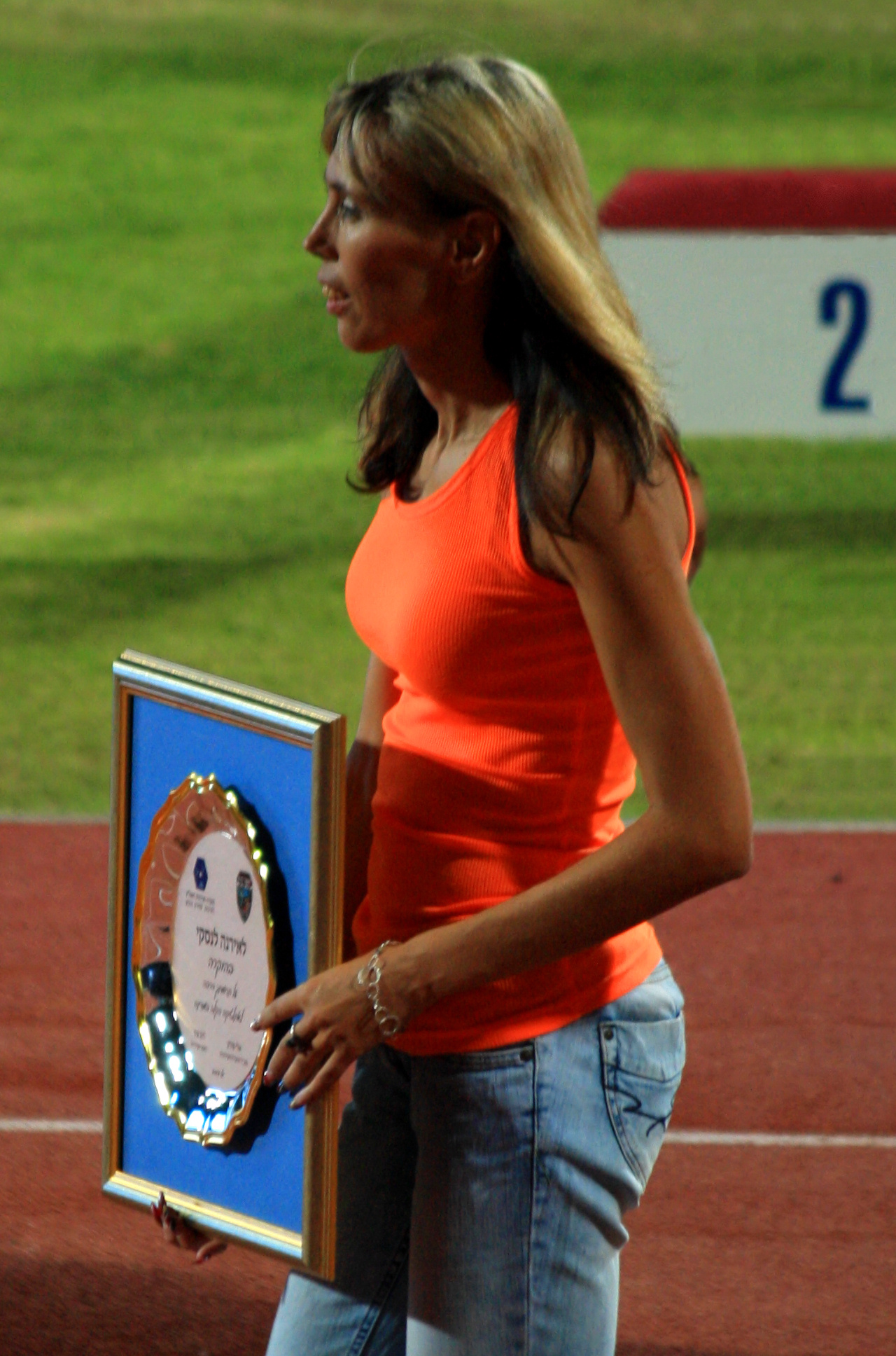 אירנה לנסקי מקבלת אות הוקרה על פעילותה רבת השנים באתלטיקה הישראלית, במסגרת טקס חנוכת "אצטדיון האתלטיקה ראשון לציון", 29 ביולי 2013.